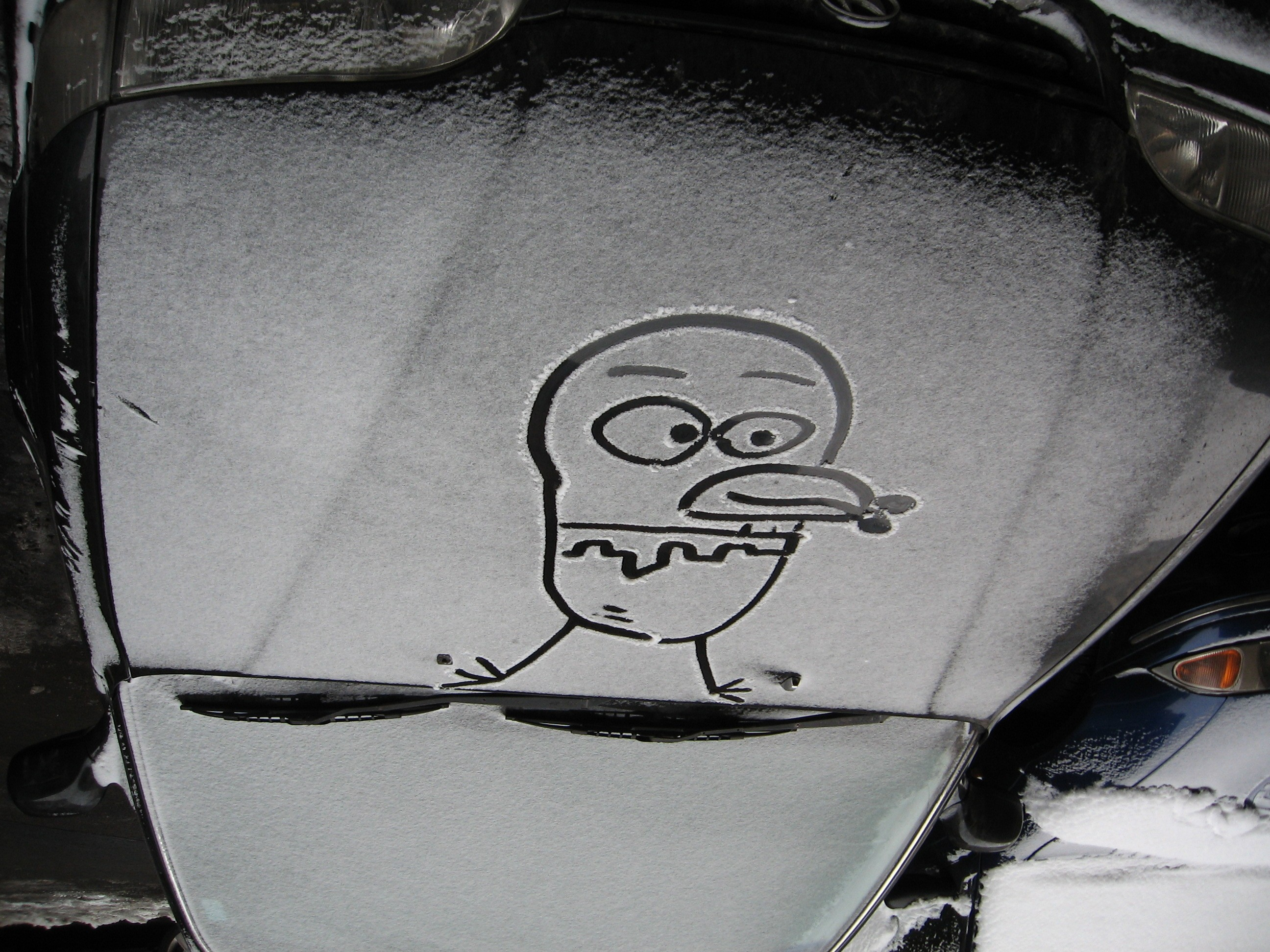 Kyoro-chan. / Kukucska egy autó motorházán.